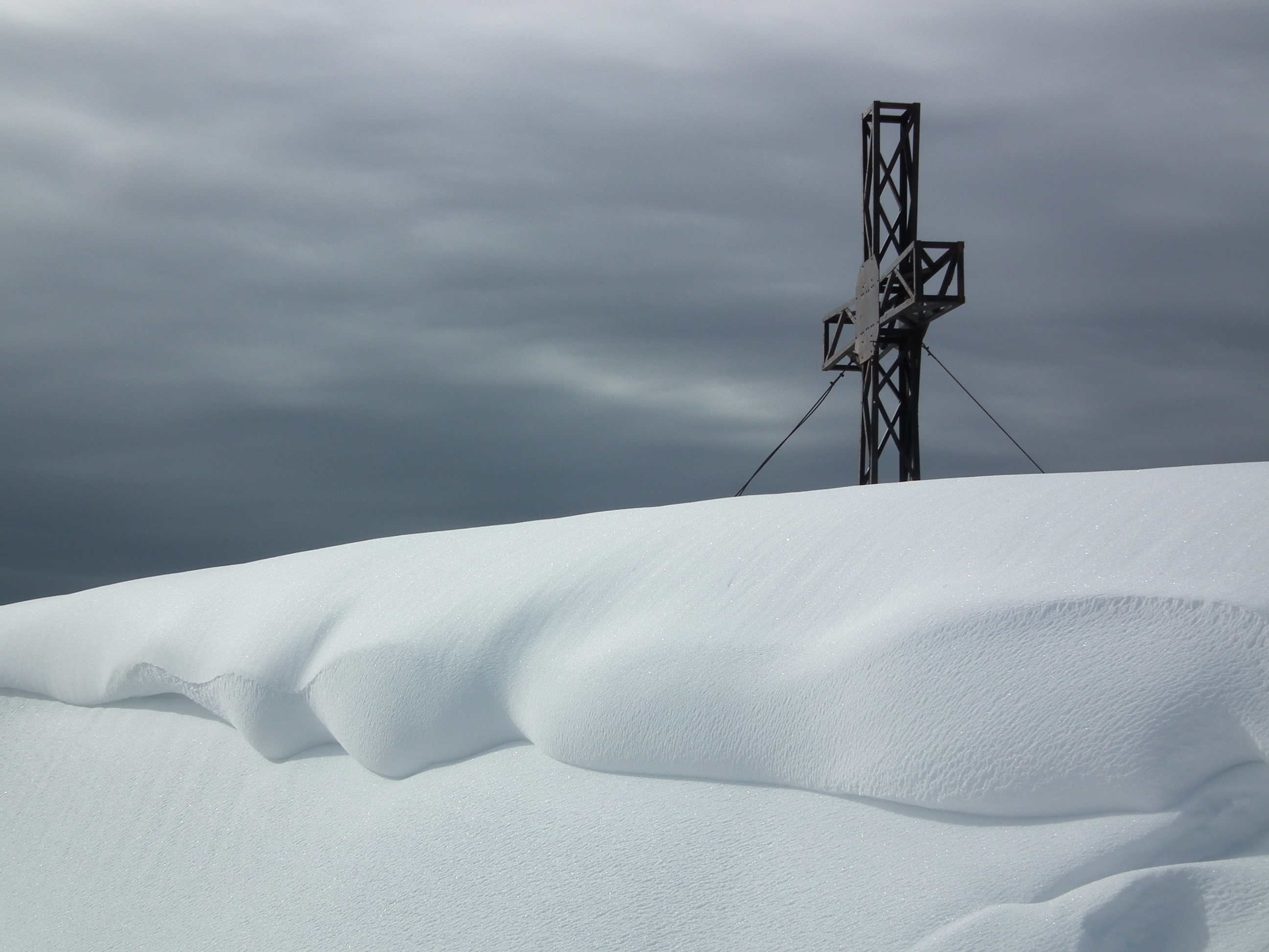 La Pelosa